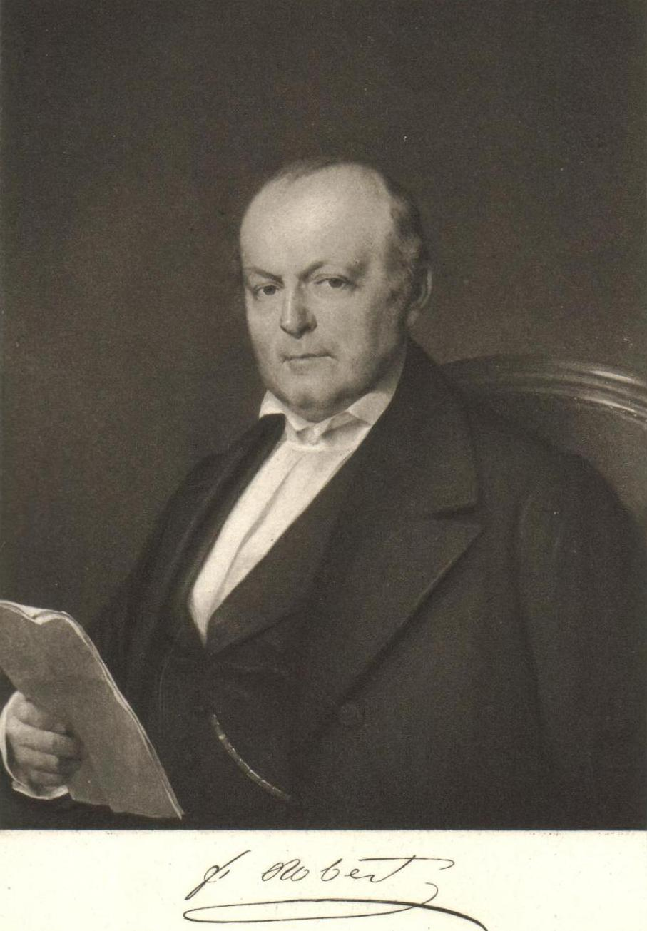 Julius Robert (4. nebo 14. 6. 1826 – 9. /případně 12./ 2. 1888), majitel cukrovaru (vynálezce difuse) a šéf obchodního domu Robert & Komp. v Židlochovicích. [1]